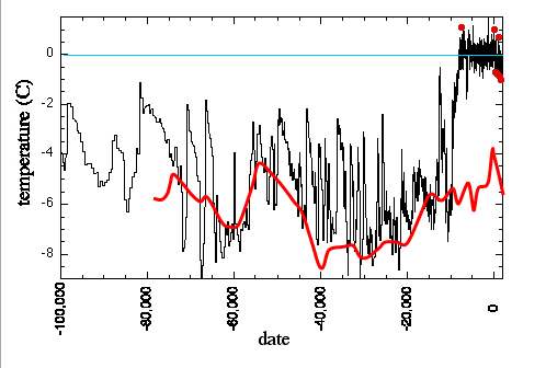 Sammenfald mellem Jordens magnetfeltsvariation og temperaturvariation. Den mørke kurve viser temperaturvariationen gennem 100.000 År. Den røde kurve viser Jordens magnetfelts styrkevariation gennem 82.000 år